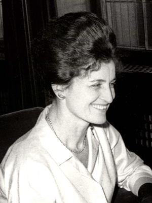 Srpski (latinica): Inventarski broj:1963_221_043